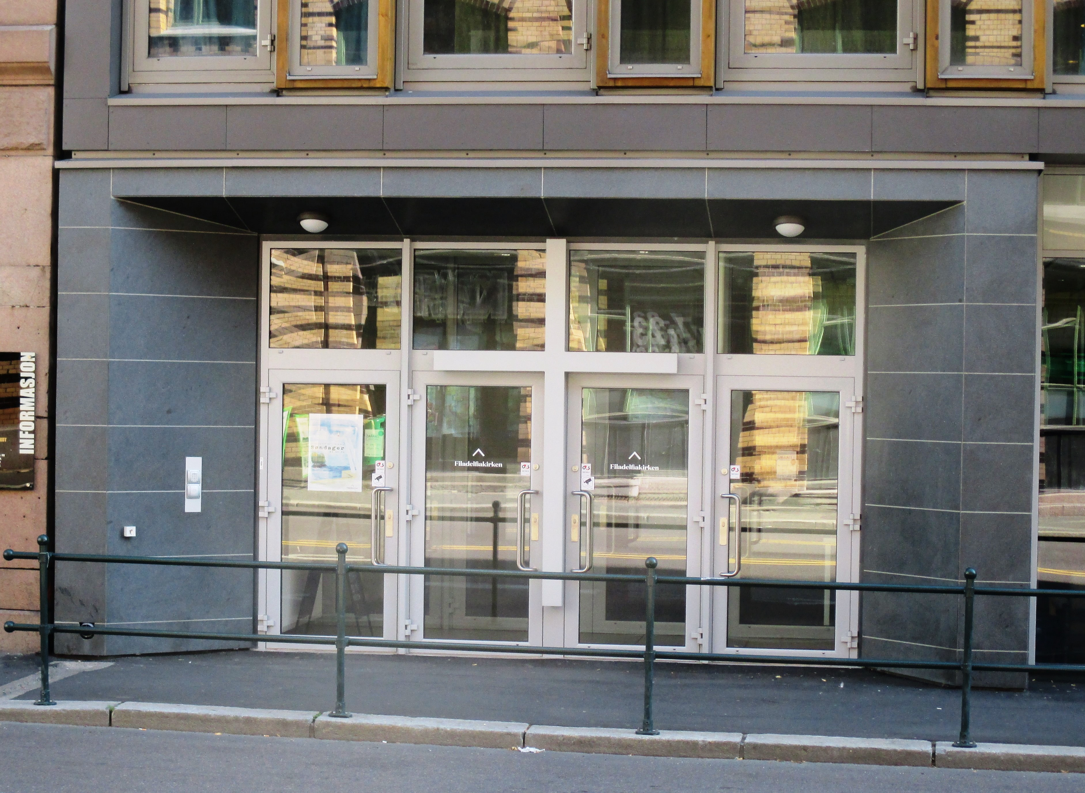 Inngangspartiet til Filadelfia Oslo etter oppussing av bygården, flyttet noe til venstre i forhold til tidligere.